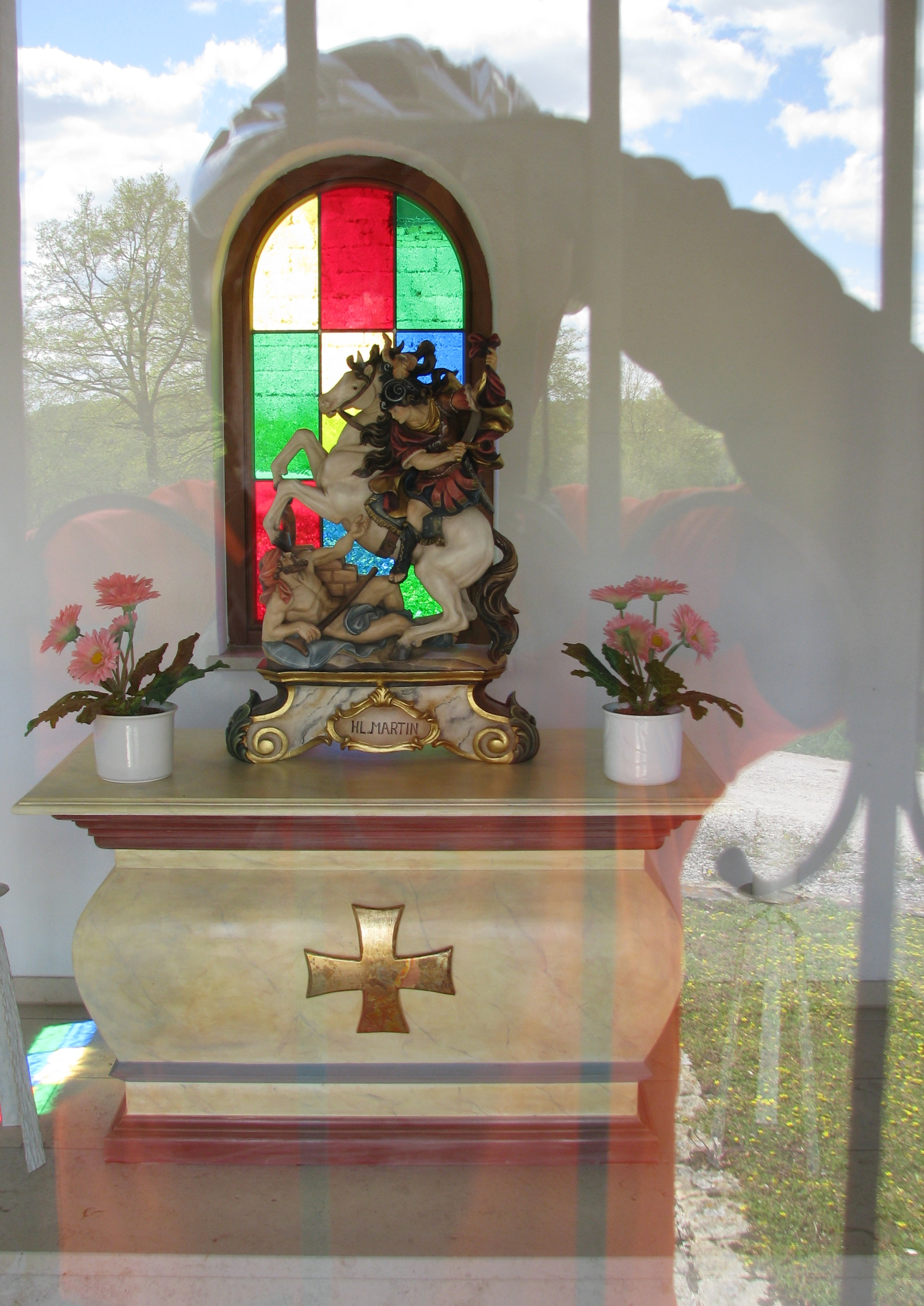 Thannbrunn, Ortsteil von Berching im bayerischen Landkreis Neumarkt in der Oberpfalz, Dorfkapelle St. Martin, Altar mit Martinsfigur